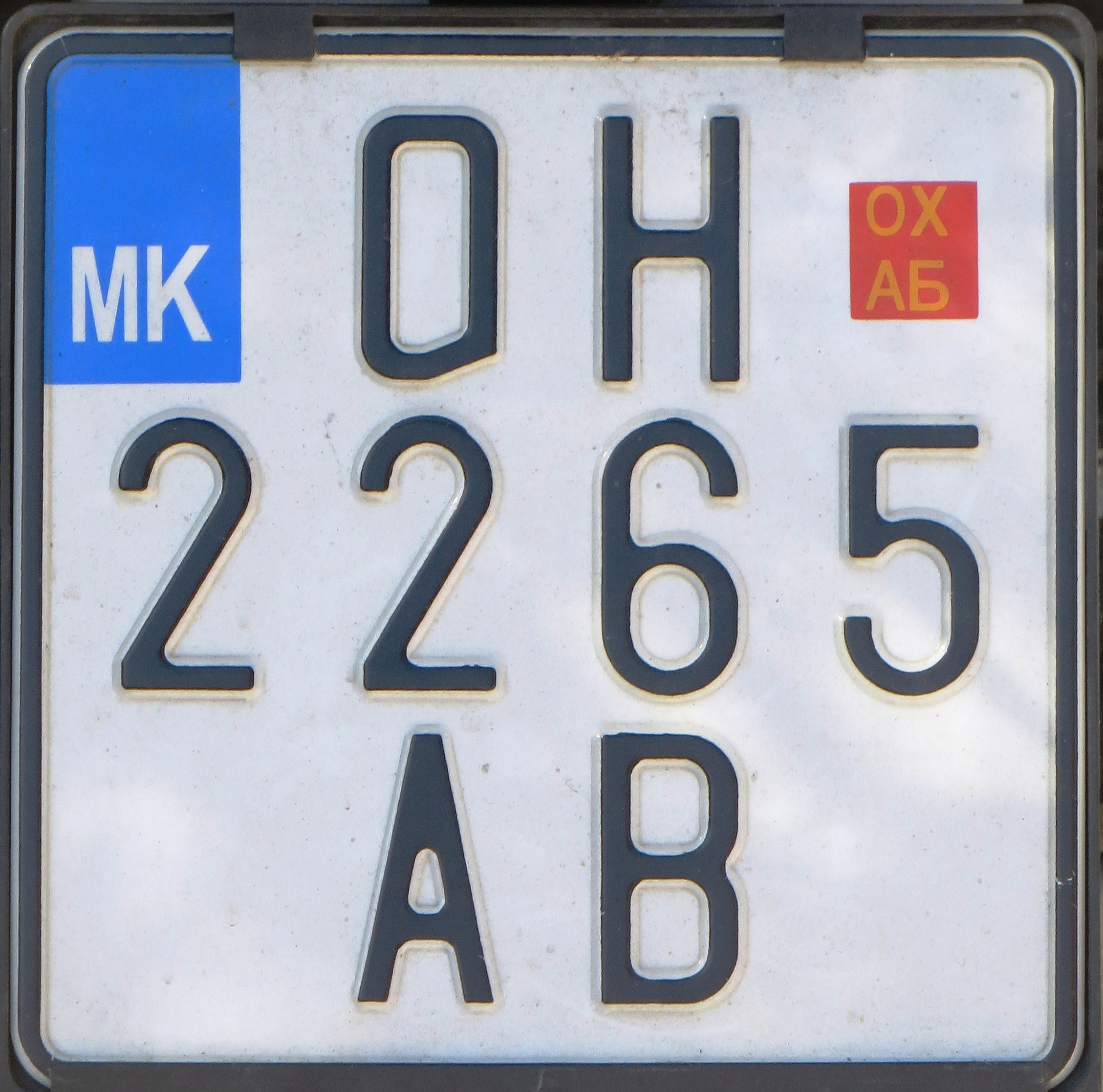 Motorfiets kenteken Macedonië